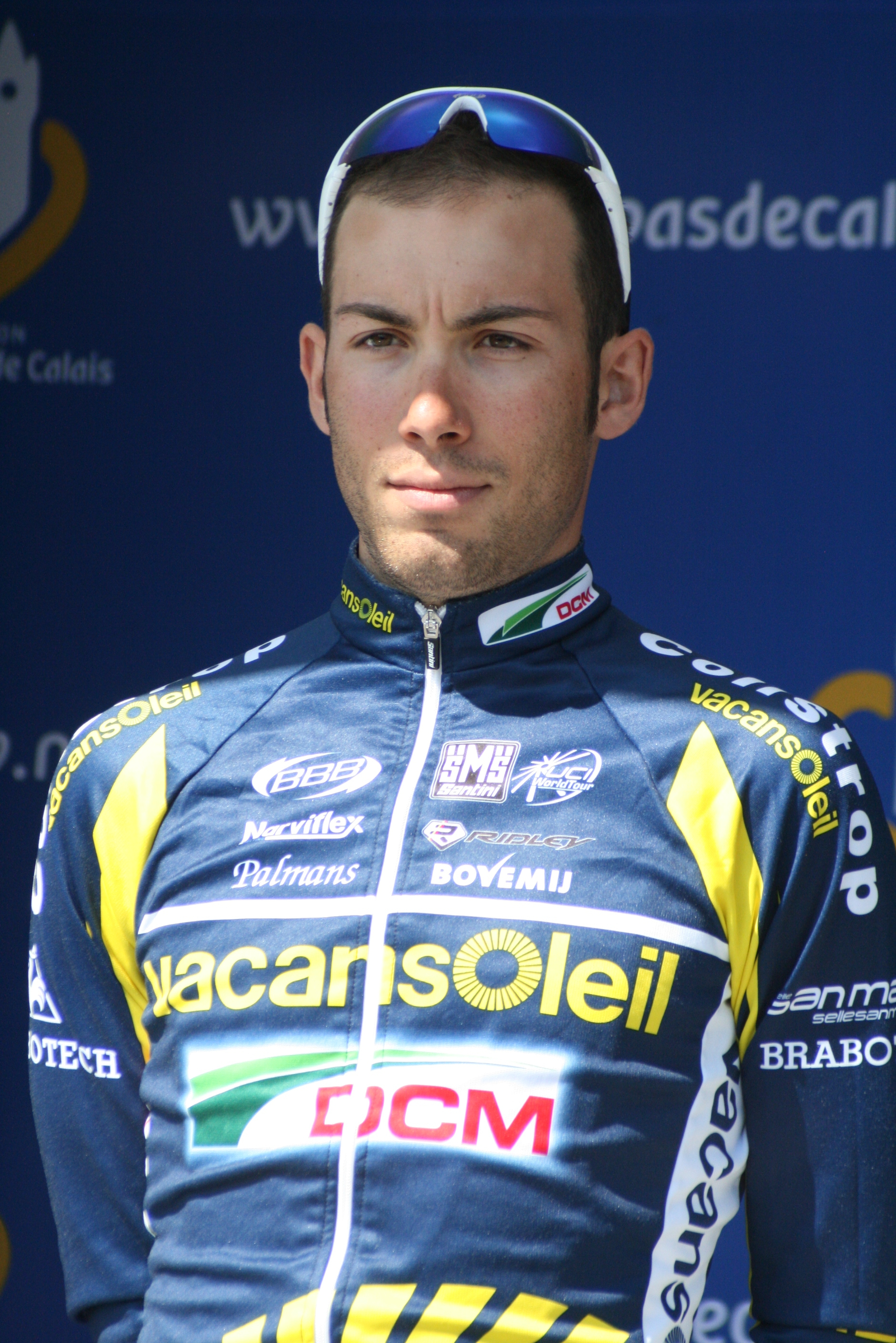 Présentation des coureurs au départ de la première étape Marcello Pavarin